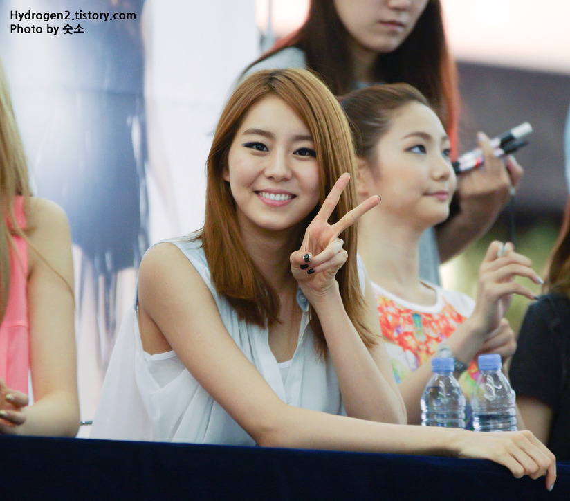 2012년 7월 1일 영등포 타임스퀘어 핫트랙스 팬사인회에서.